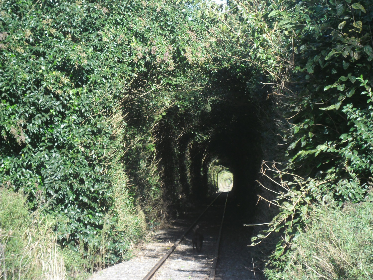 túnel de árboles en Gobernador Andonaegui, Argentina. Estos se formaron a la vera de la vía por el paso de los trenes formando un bellísimo paisaje natural.